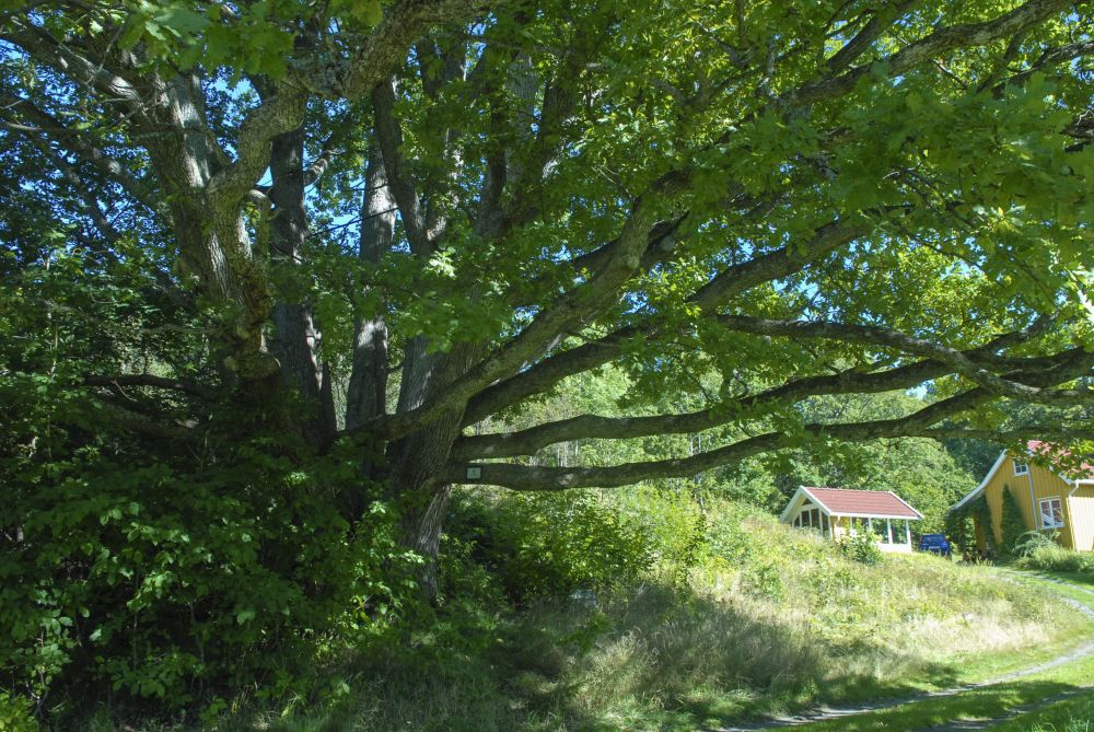 Brevikeika er et stort, flerstammet eiketre, antagelig 400 år gammelt.